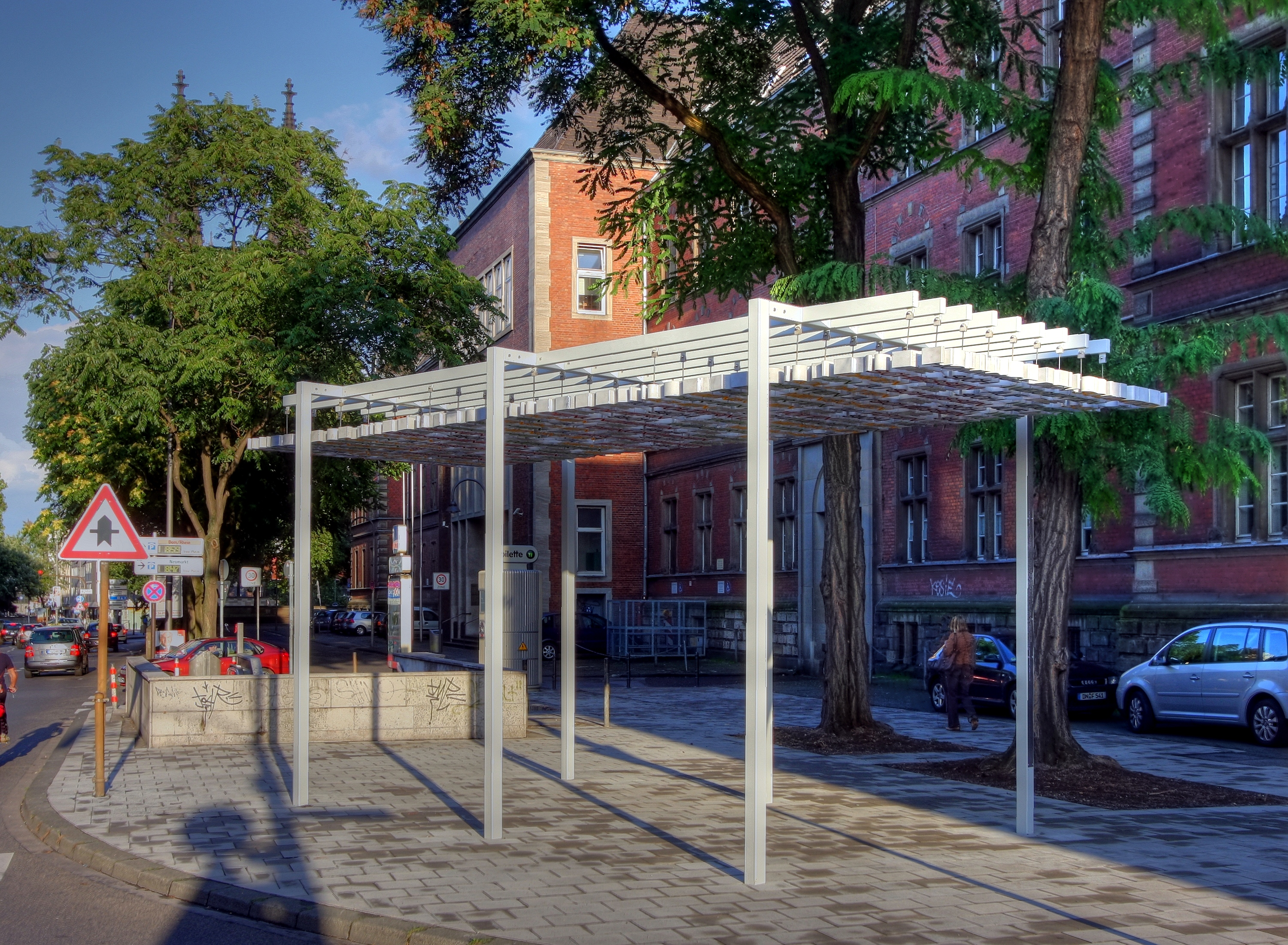 Denkmal für Deserteure und Opfer der NS-Militärjustiz. Standort: Appellhofplatz, Ecke Neven-Dumont-Str./Burgmauer, Köln. Künstler: Ruedi Baur